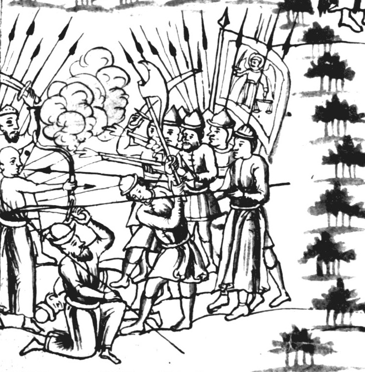 Покорение Пелымских уездов